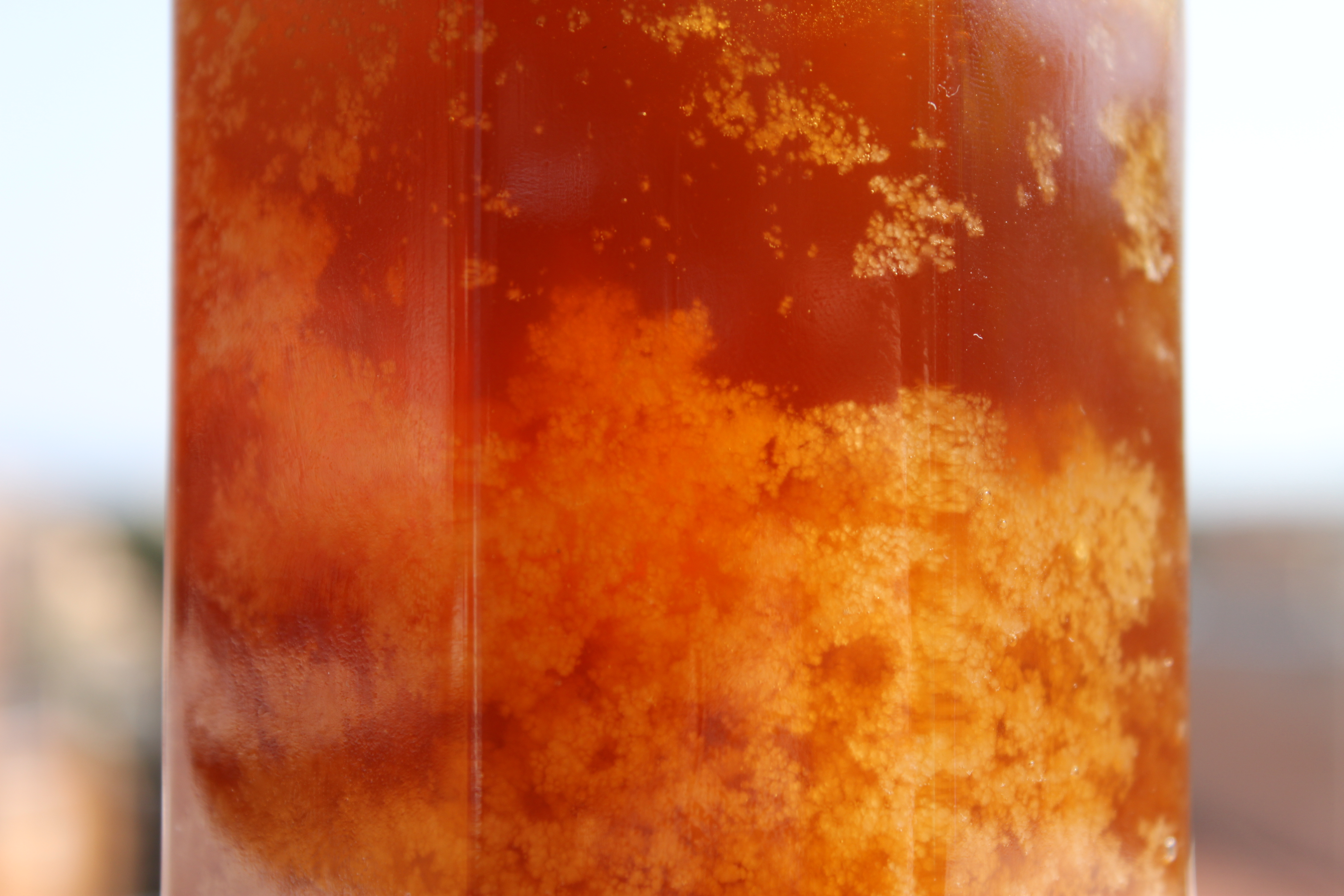 Cristallizzazione del miele (miele millefiori biologico italiano)